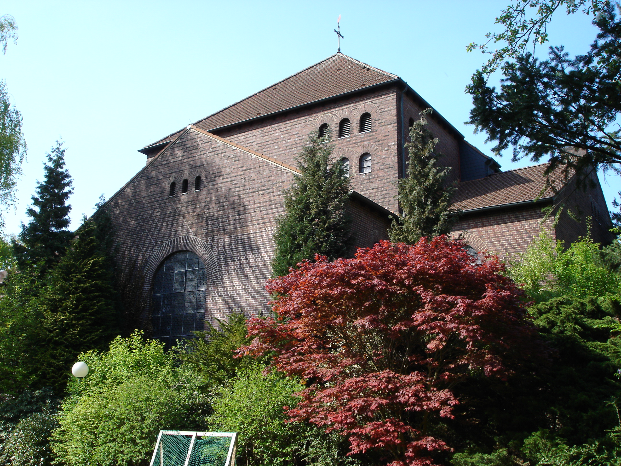 Südansicht von St. Konrad in Münster, Germany